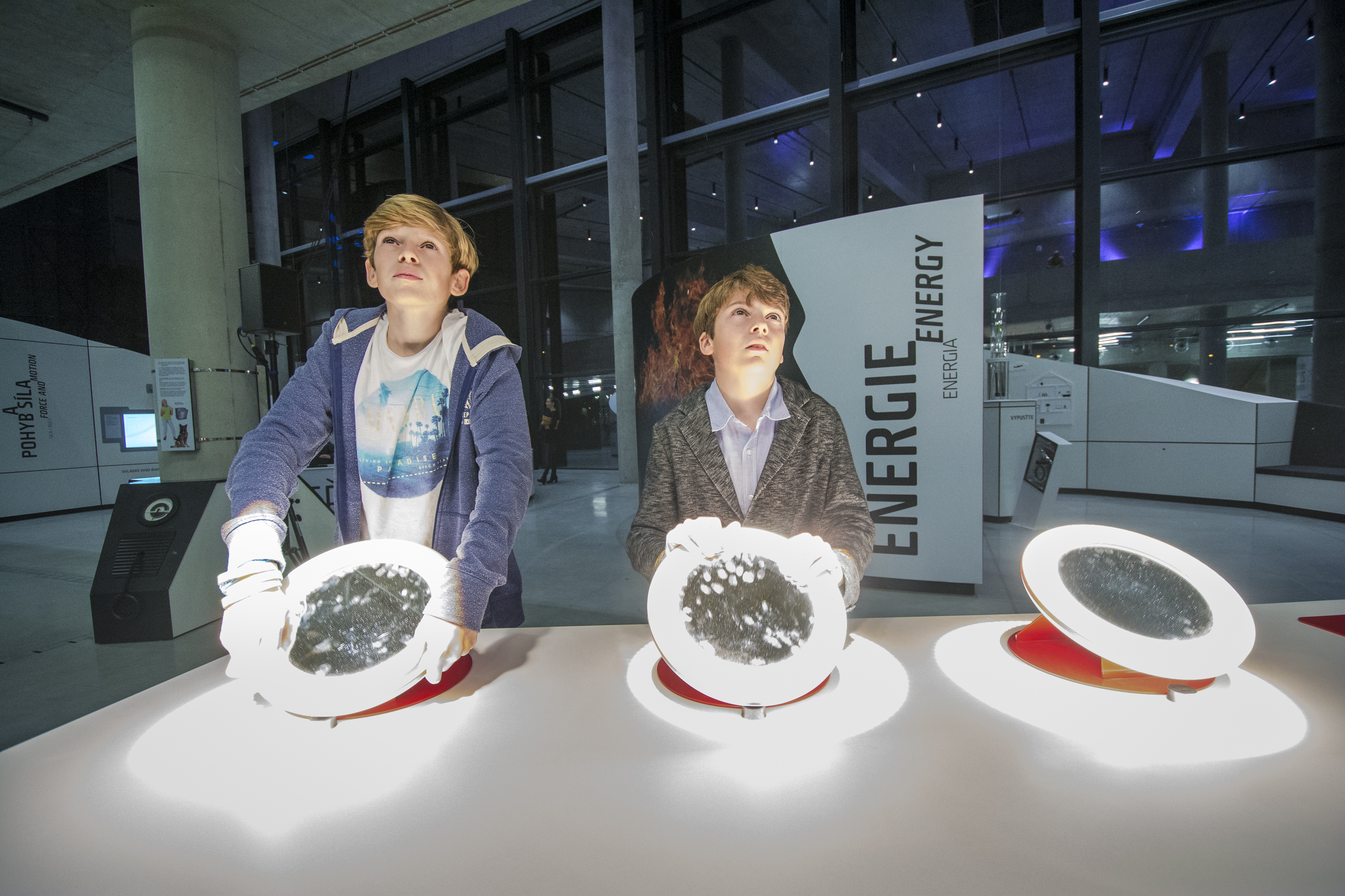 Svět techniky v Dolní oblasti Vítkovic